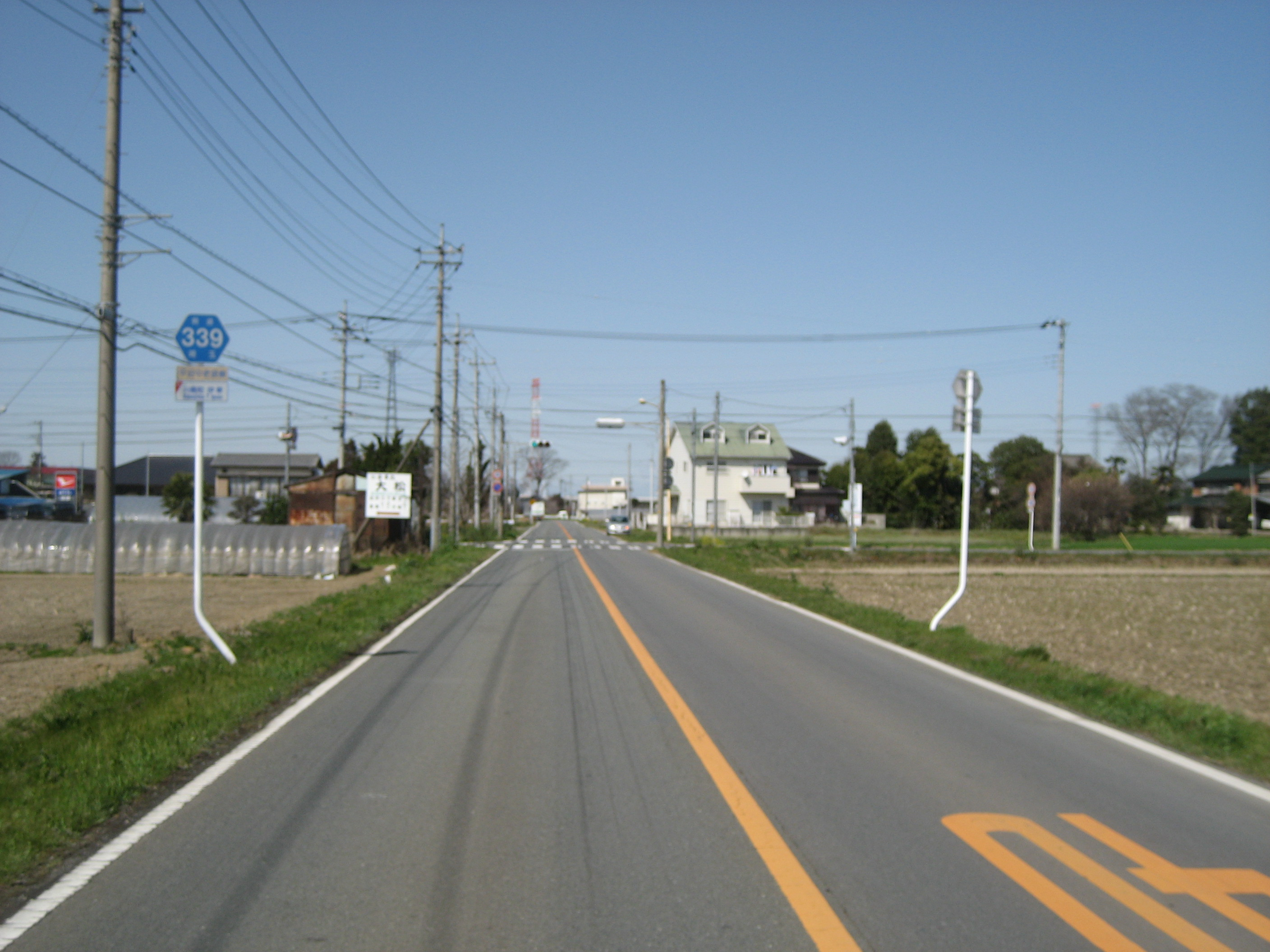 埼玉県道339号線川島町内